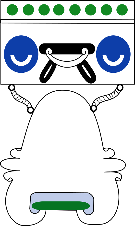 Glifo del Municipio de Pilcaya, en el Estado de Guerrero, México